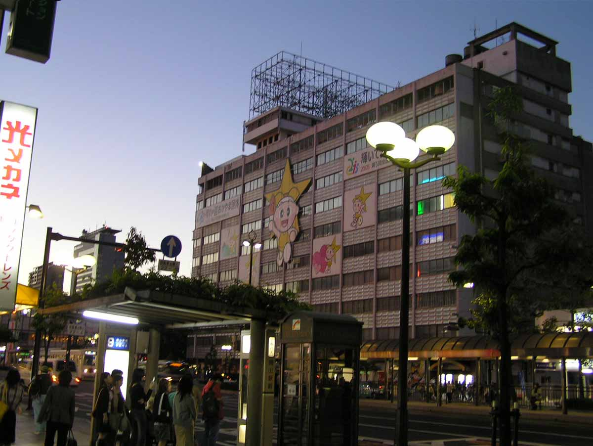 Okayama-Kaikan building under close